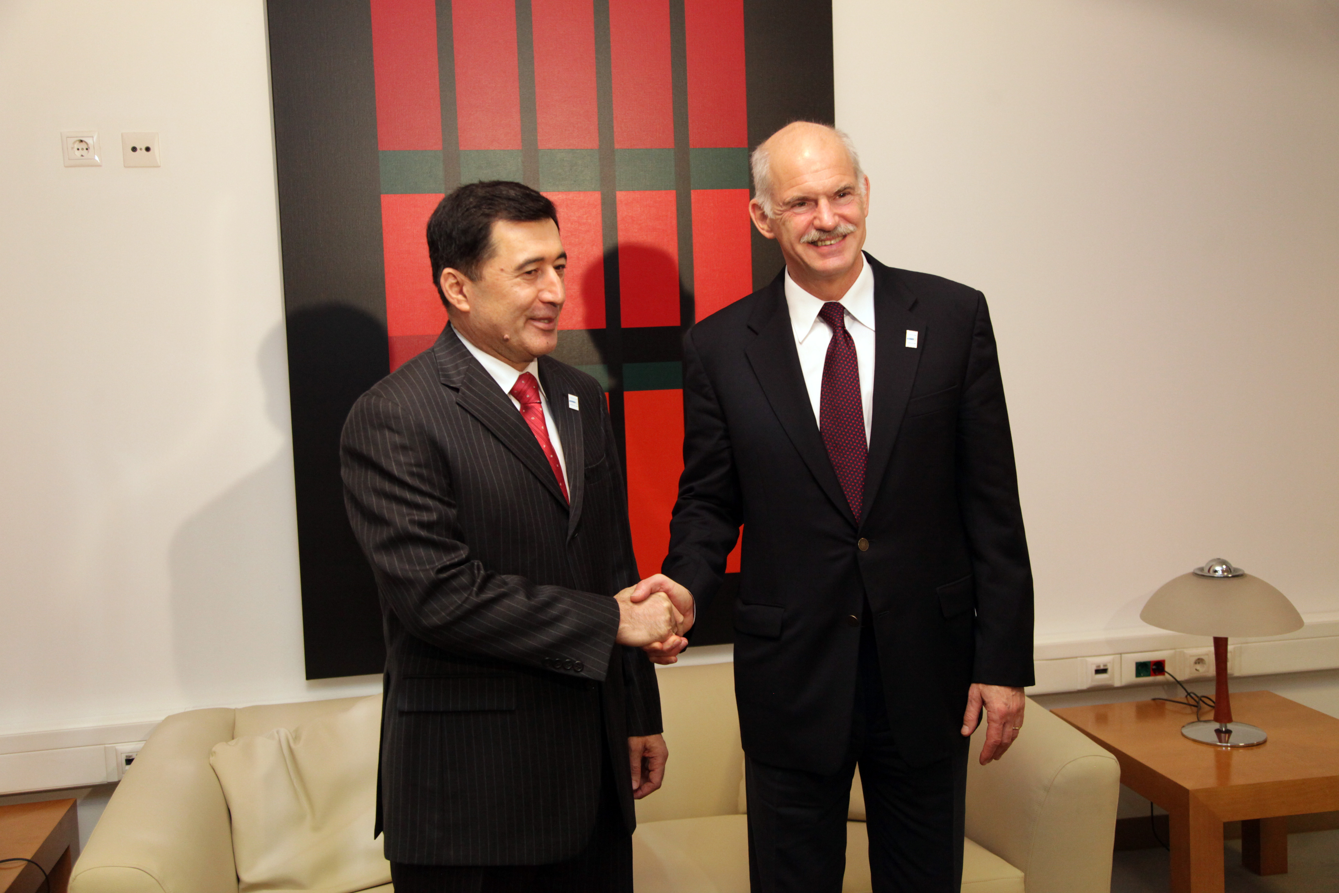 Συνάντηση με τον Υπουργό Εξωτερικών του Ουζμπεκιστάν, Vladimir Norov